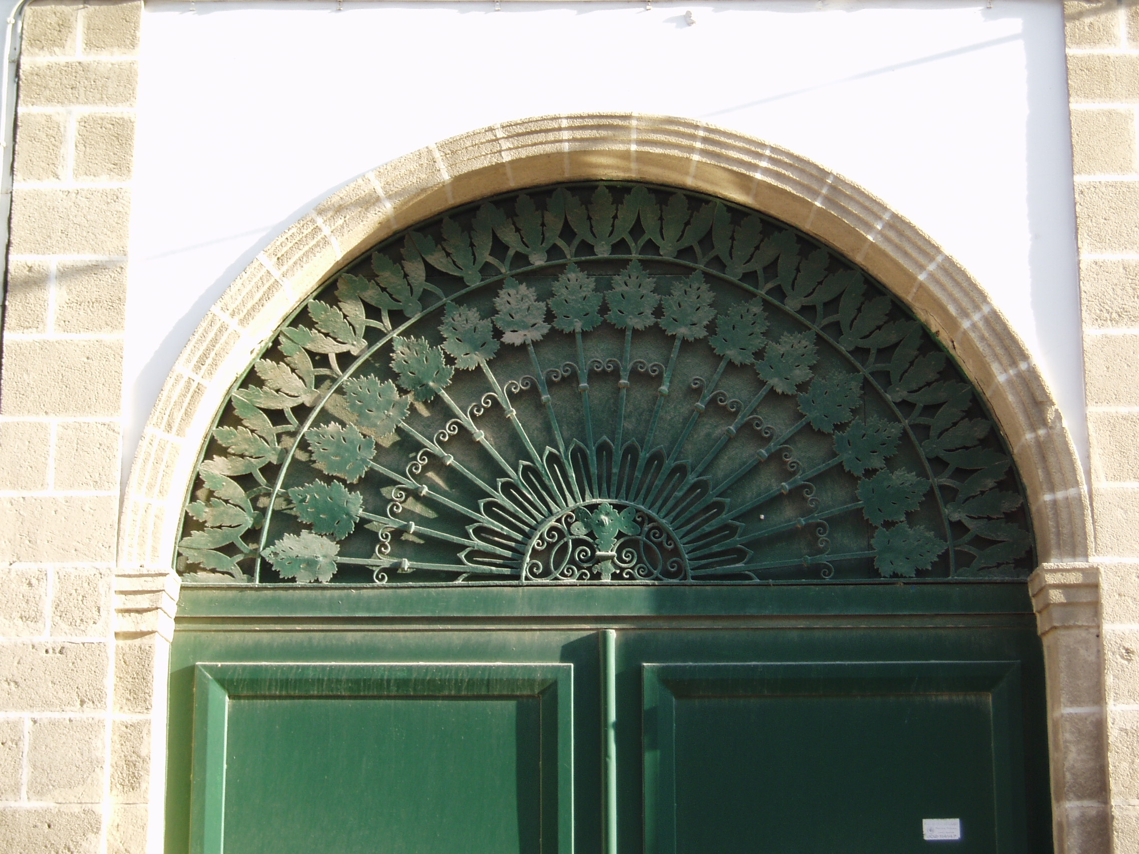 Bodega en el Campo de Guía, El Puerto de Santa María, España.